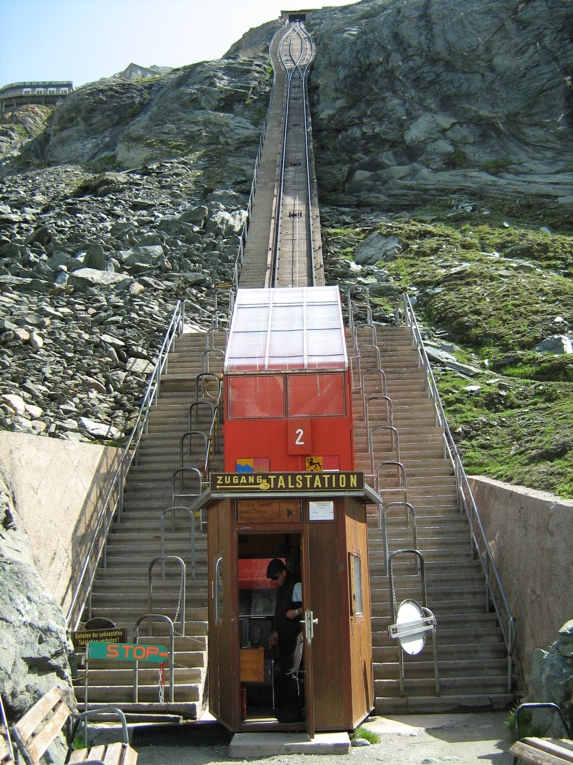 Großglockner Gletscherbahn set fra Dalstationen ved Pasterze-gletsjeren og op imod Topstationen ved Kaiser Franz Josefs Höhe.